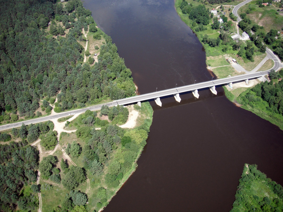 Bridge over Nemunas in Merkine +54°9' 26.58", +24°10' 48.57" (54.157383, 24.180157)